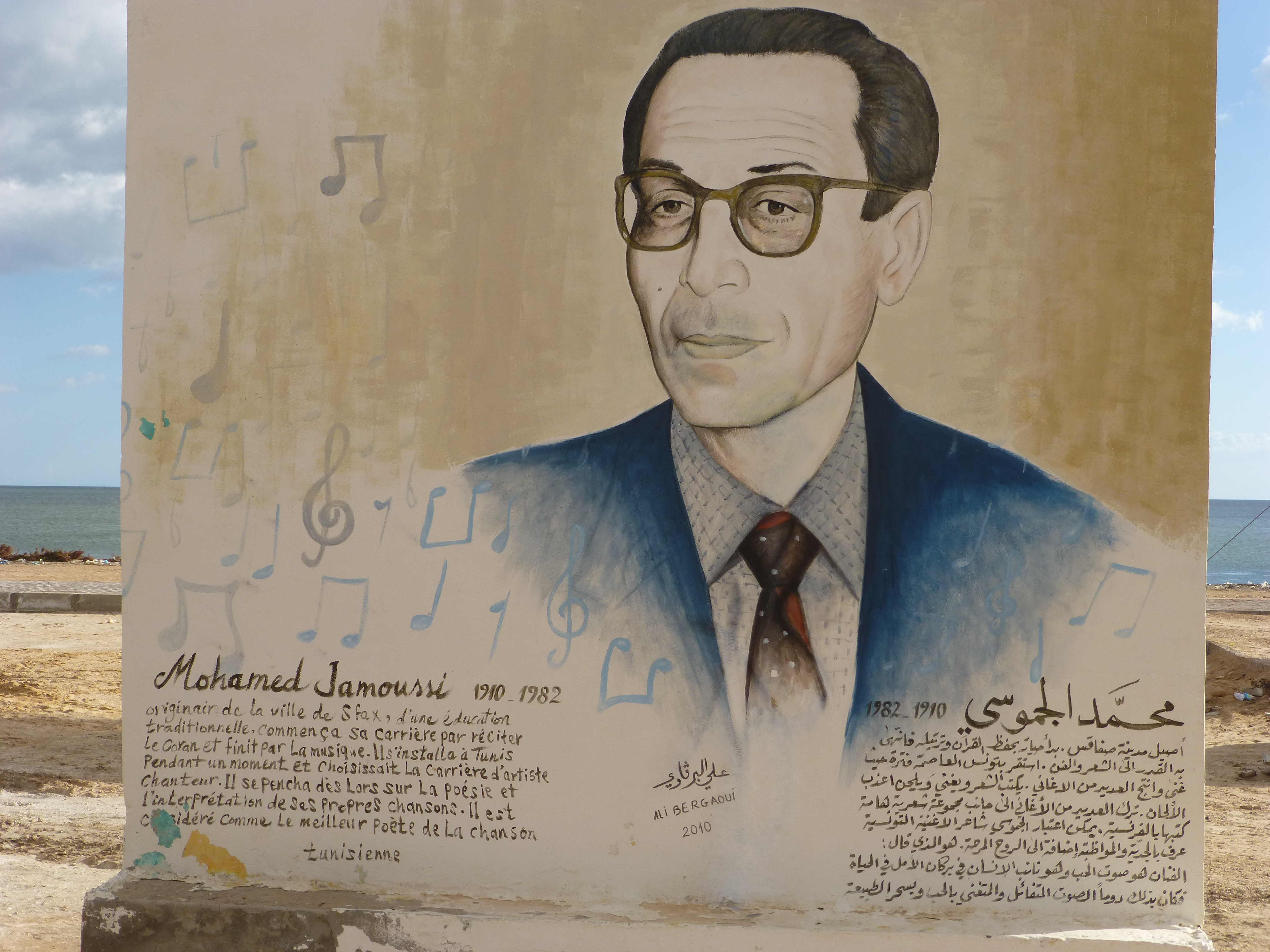 Plaque à la mémoire du musicien Mohamed Jamoussi exposée sur la corniche de la ville de Mahrès.